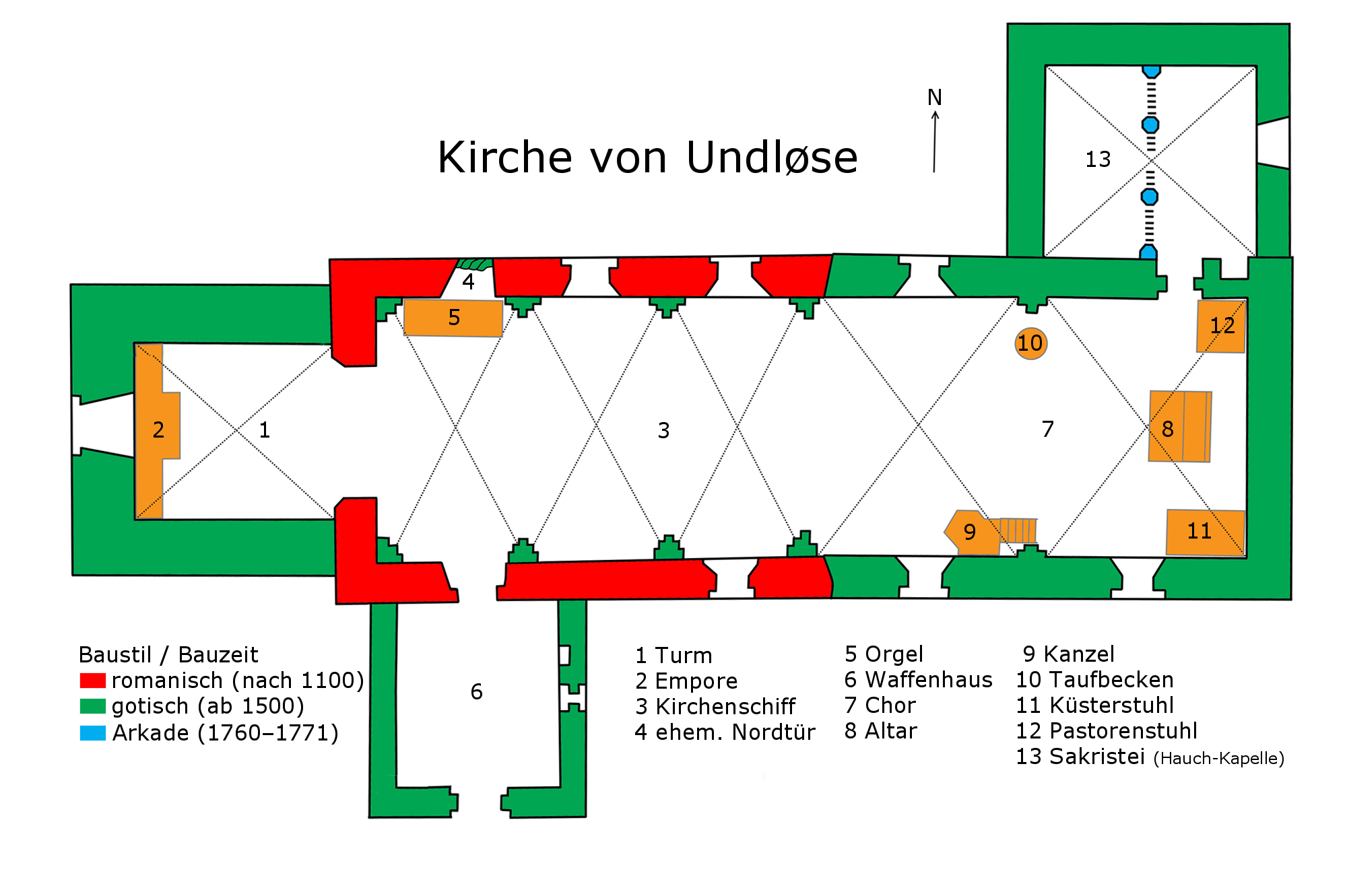 Kirche von Undløse, Dänemark (West-Seeland). Grundriss für zwei Bauperioden mit Position des Inventars